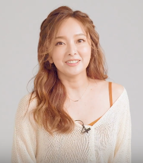 愛紗です。